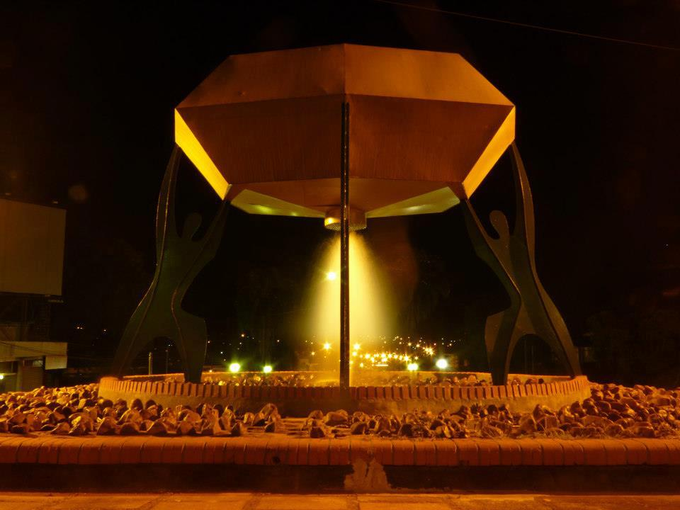 Monumento al Mensú o el Tarefero, mas conocido como "EL DIAMANTE", Oberá Misiones Argentina